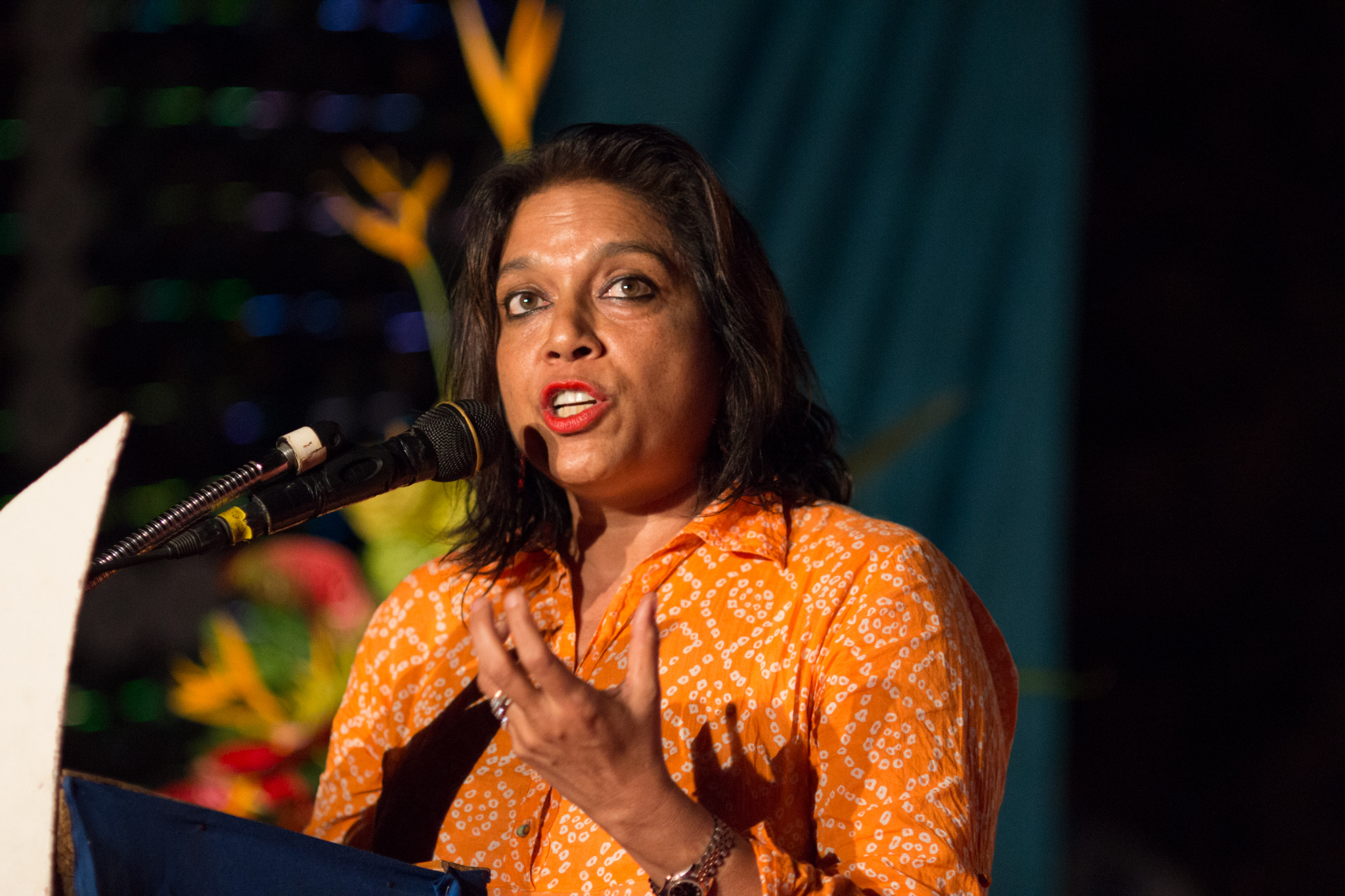 filmmaker Mira Nair at ZIFF 2013